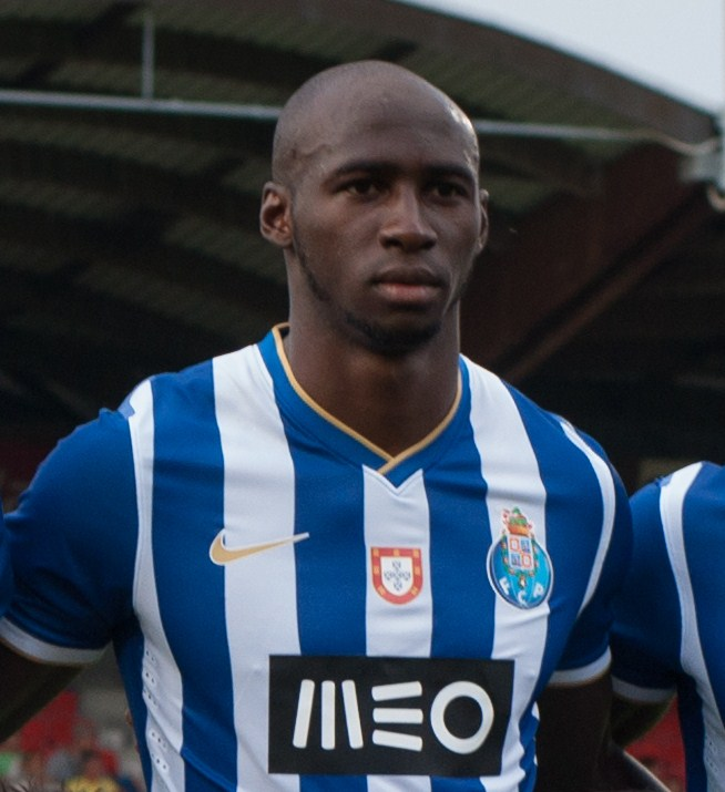 Eliaquim Mangala au FC Porto en 2013.